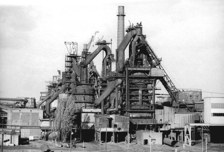 Eisenhüttenstadt, Eisenhüttenkombinat Ost, Hochofen ADN-Rainer Weisflog 8.11.90 Eisenhüttenstadt: Wie technishe Denkmäler sehen die Hochöfen aus der Gründerzeit des Eisenhüttenkombinates Ost aus. Von ehemals sechs arbeiten nur noch vier. In Zukunft werden von den vormals 12.000 Arbeitskräften nur noch 7.000 in der EKO-Stahl AG Arbeit finden. Mehr als 700 gingen bereits in den Vorruhestand, andere werden durch die Ausgliederung von Betriebsteilen einen neuen Arbeitsplatz erhalten.Neben den allgemeinen Umstellungsproblemen belasten die Aktiengesellschaft die Stahlkrise in der Europäischen Gemeinschaft sowie die aus dem chronischen Mangel der Vergangenheit herrührende, noch nicht geschlossene technologische Produktionskette.